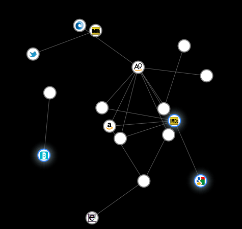 Bilde av eksempel for visning i Collusion